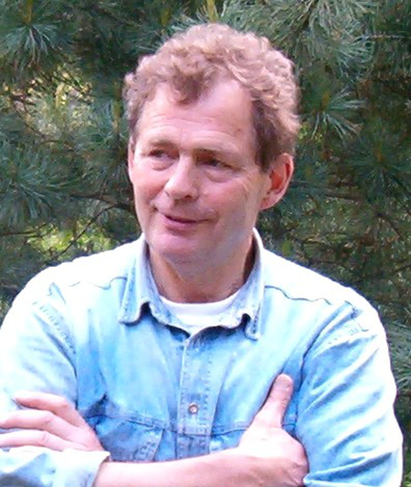 Ein Foto von Fritz Leverenz, Berlin Mai 2005